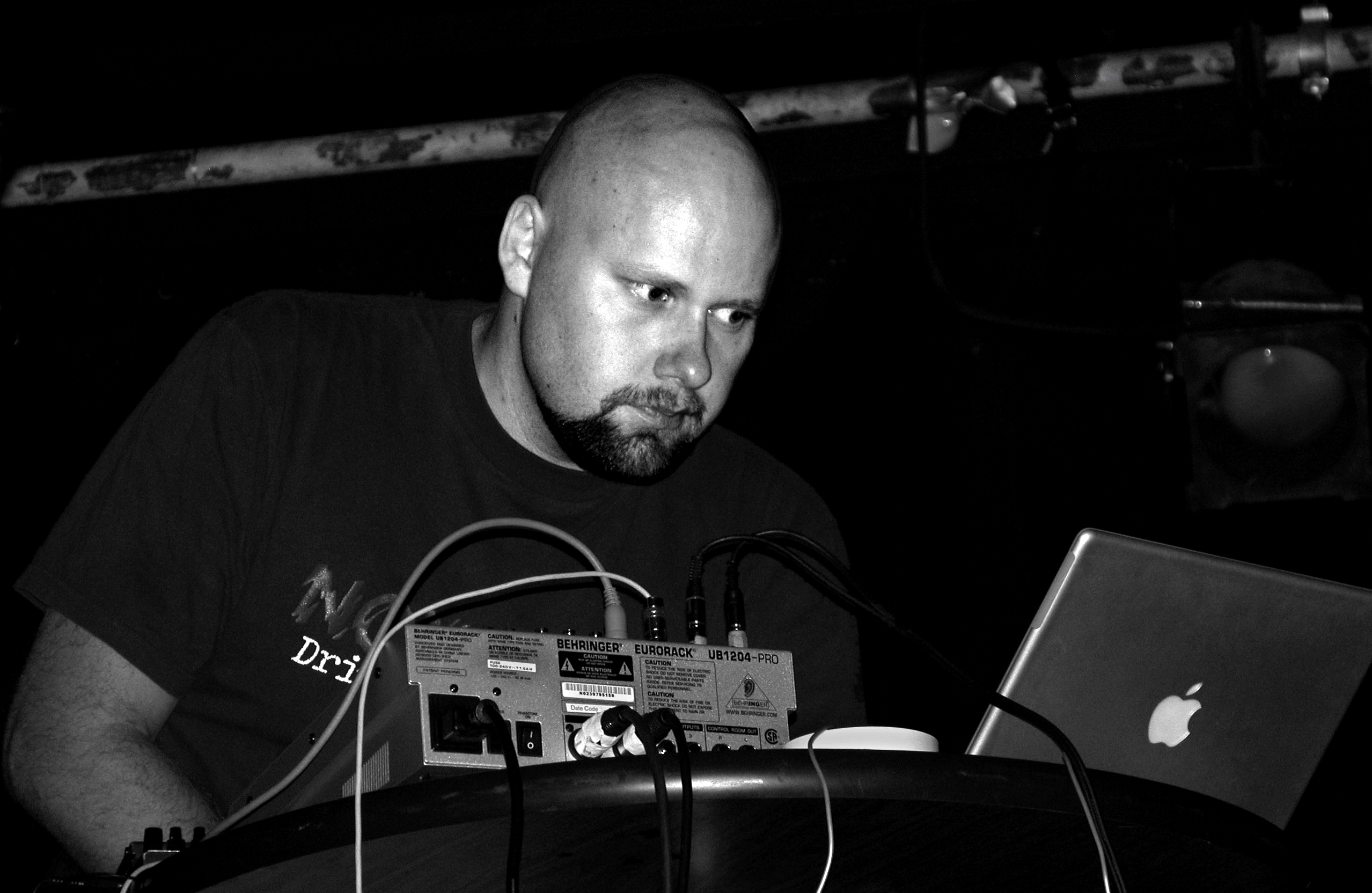 Lasse Marhaug